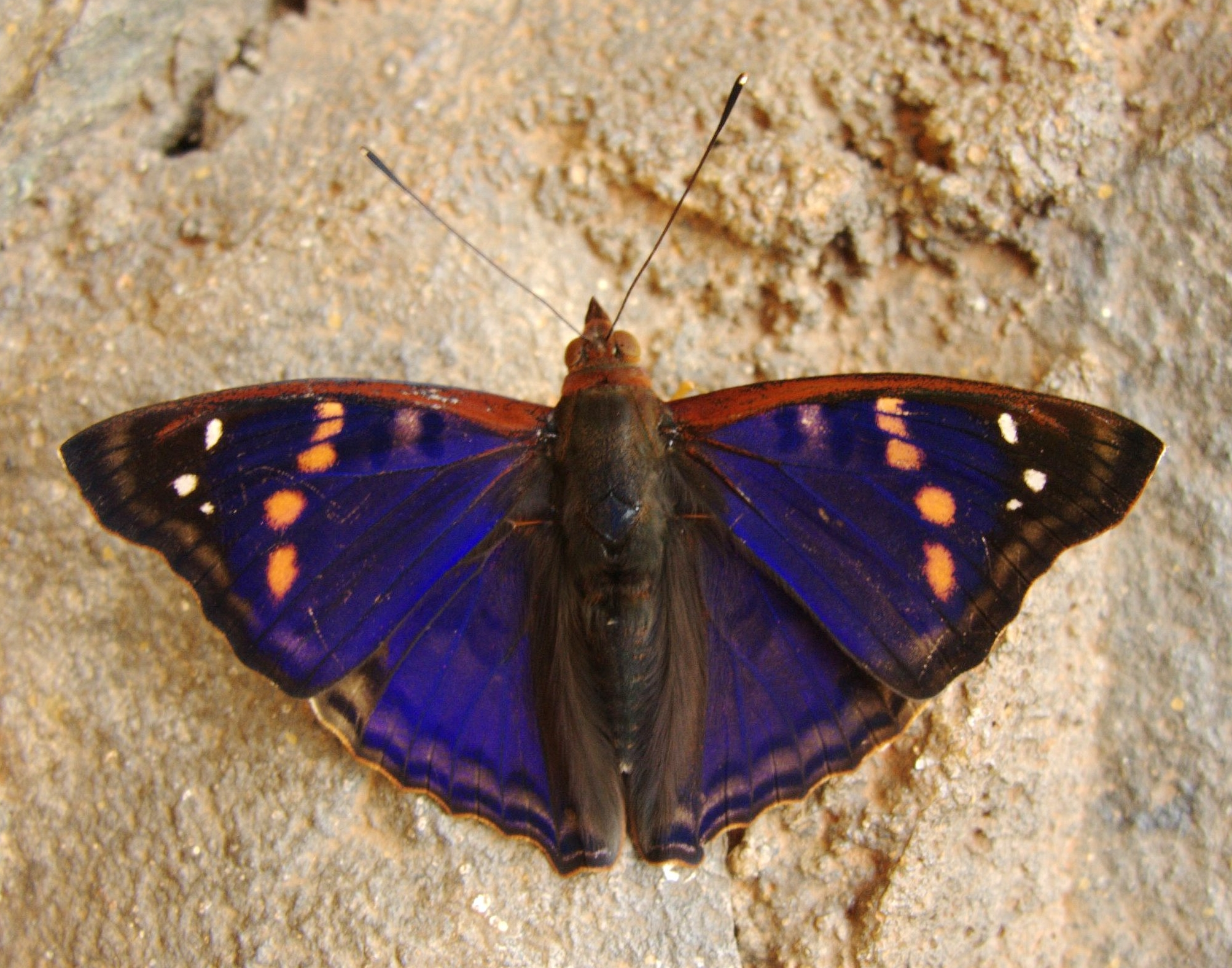 Doxocopa agathina (Nymphalidade, Apaturinae), Foz do Iguaçu, Brasil. ♂